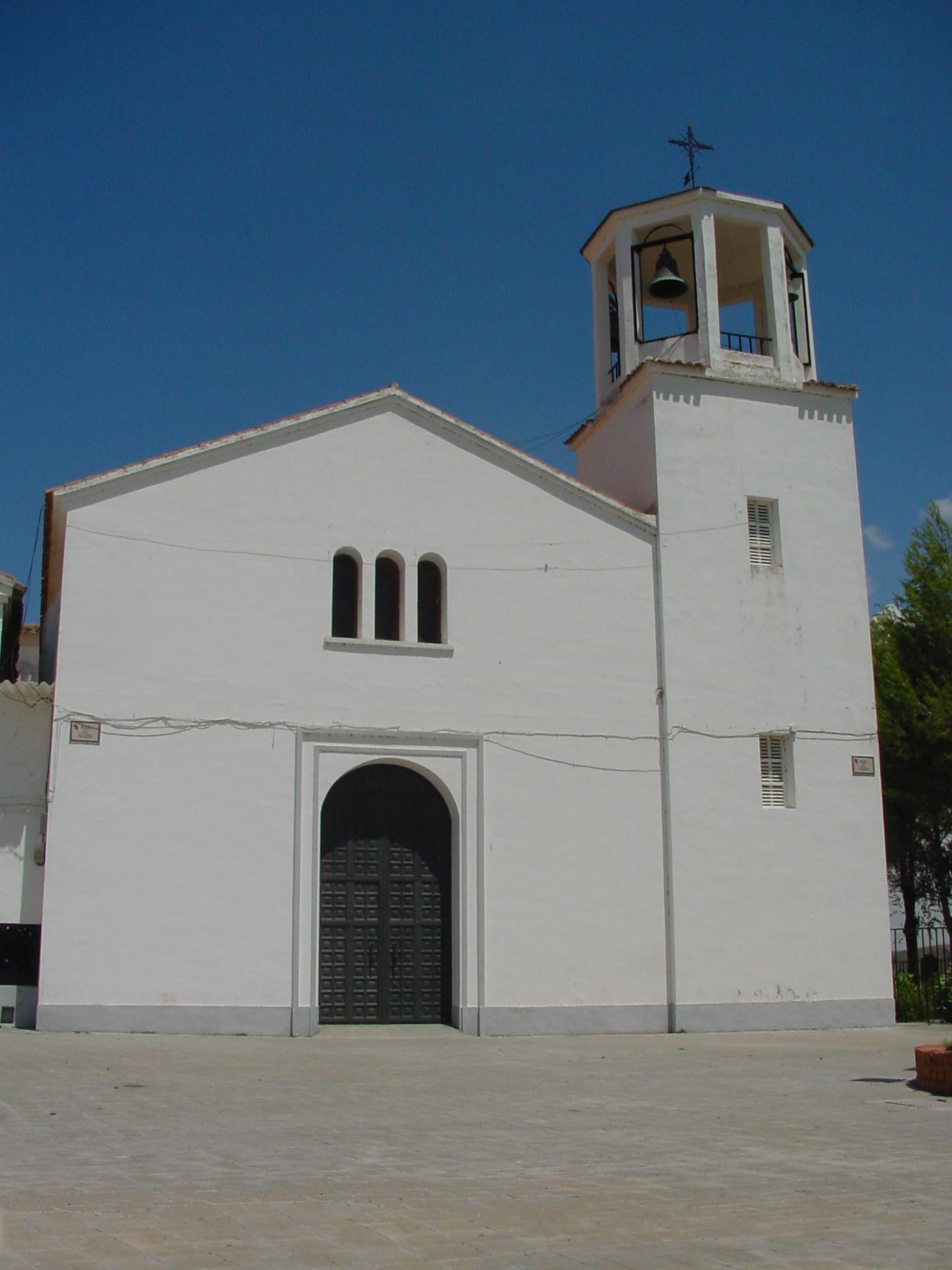 Iglesia en Villamanrique de Tajo.